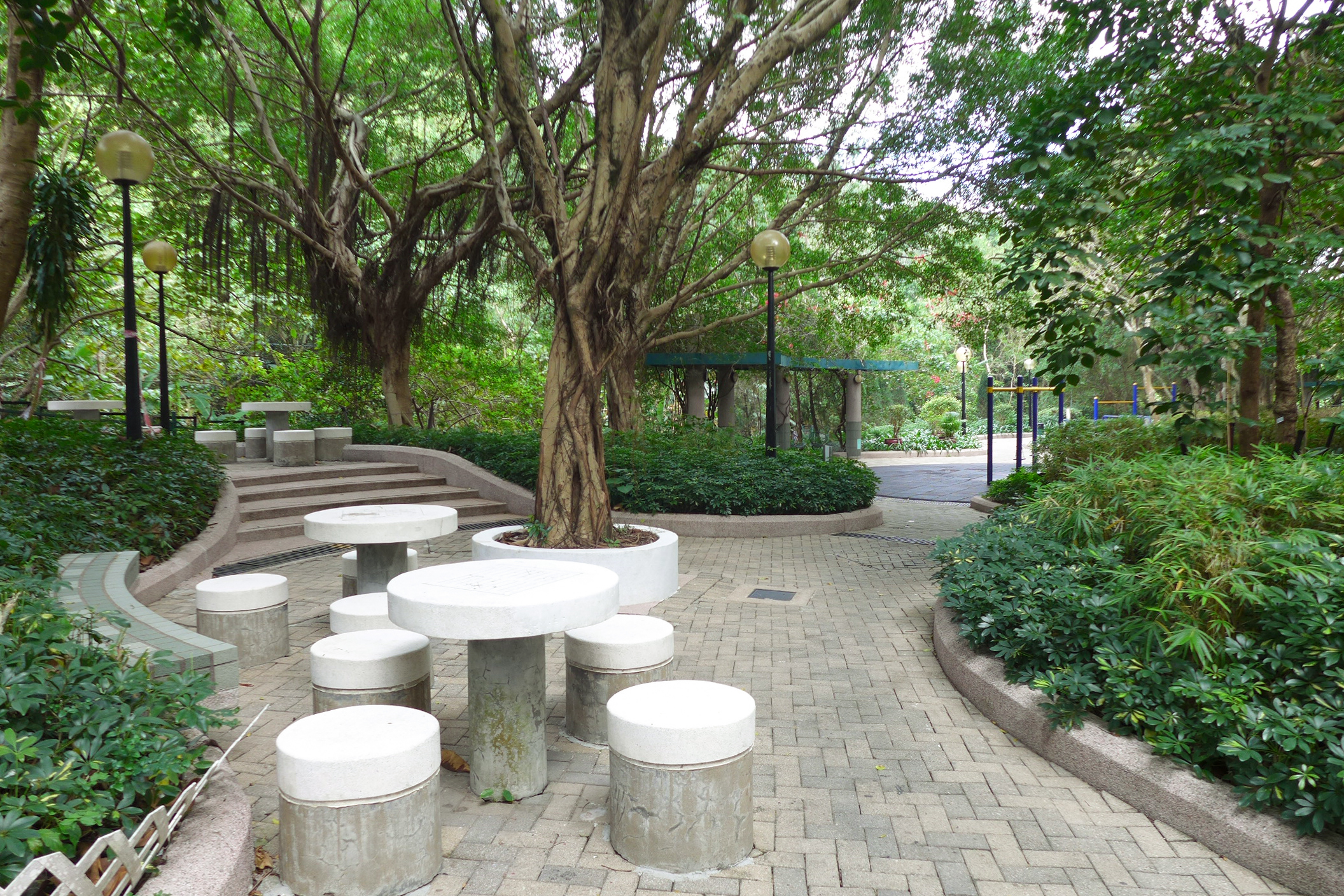 Mei Chung Court Garden